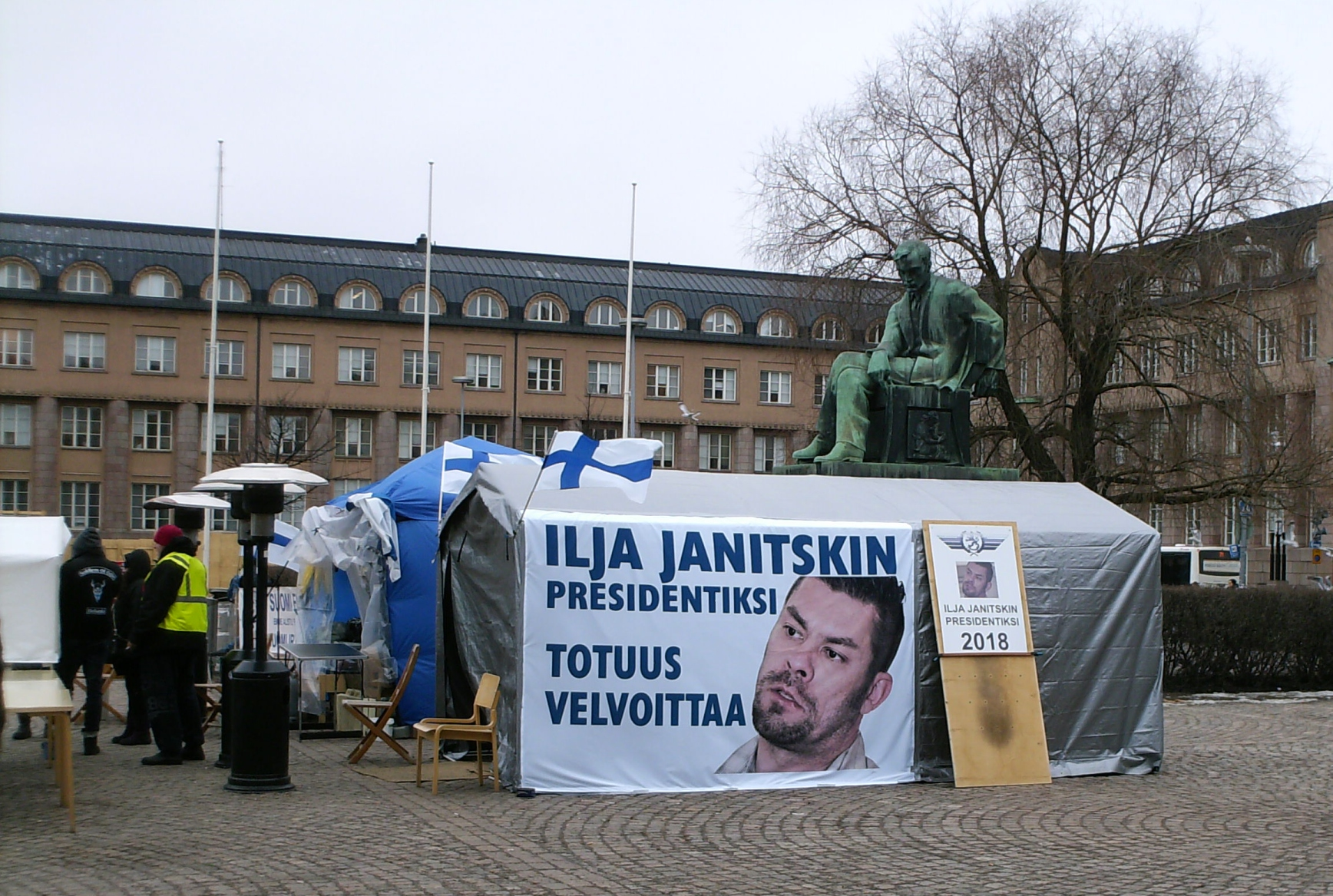 Mielenosoitus ”Suomi ensin” Helsingin Rautatientorilla: Ilja Janitskinia esitetään presidentiksi.